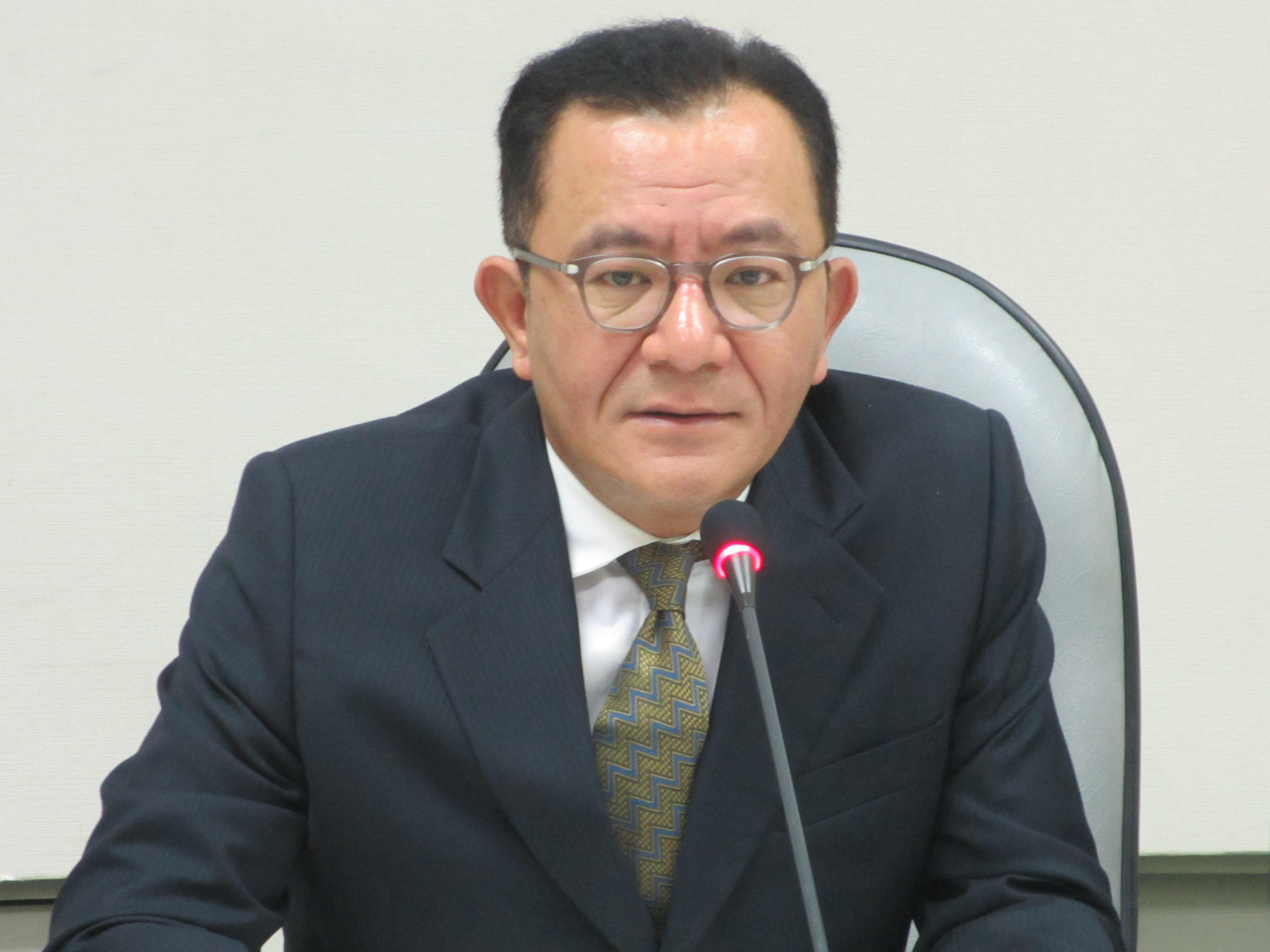 台灣在野黨民進黨立委高志鵬。